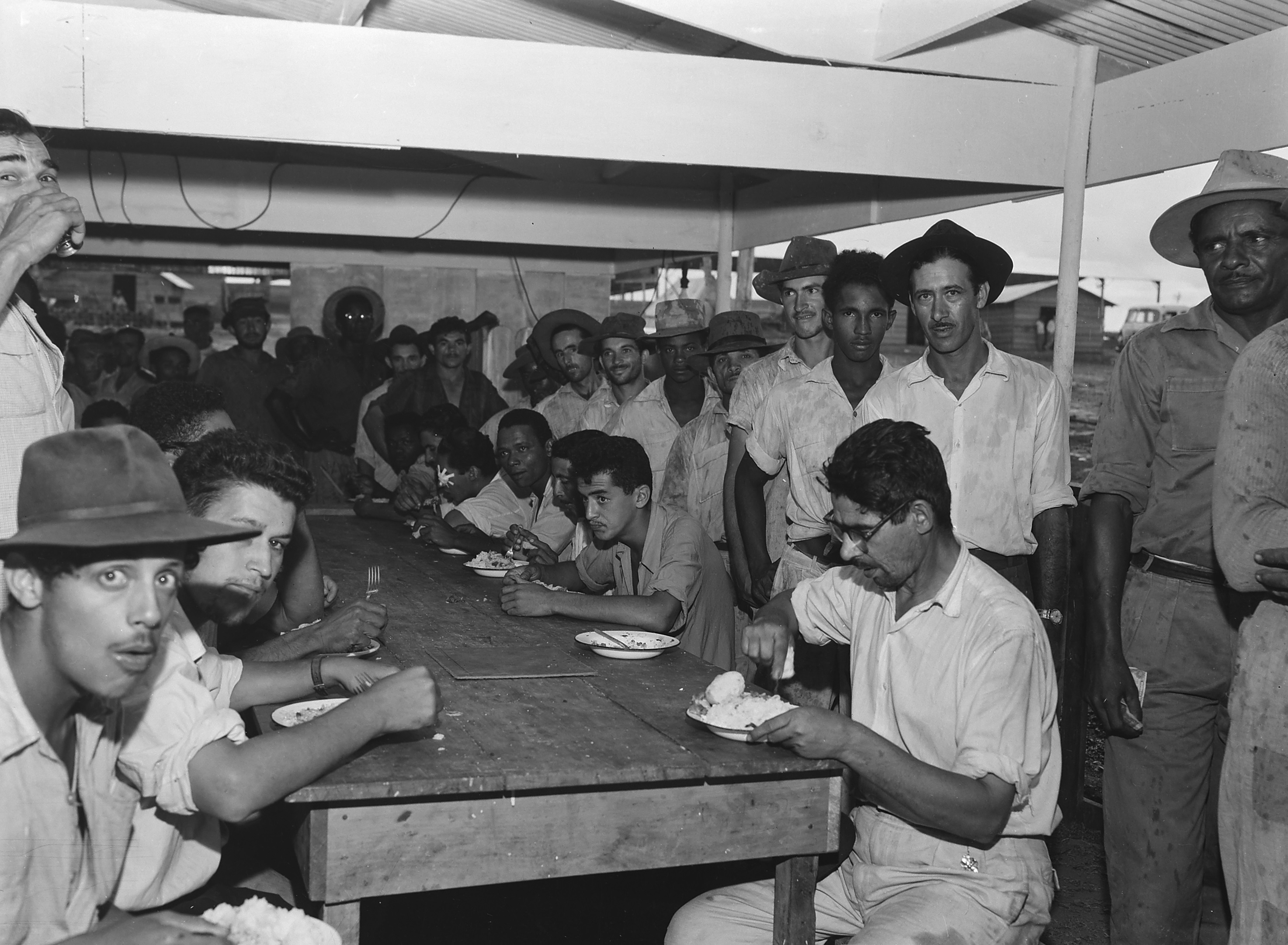 Imagem do Fundo Agência Nacional, do Arquivo Nacional